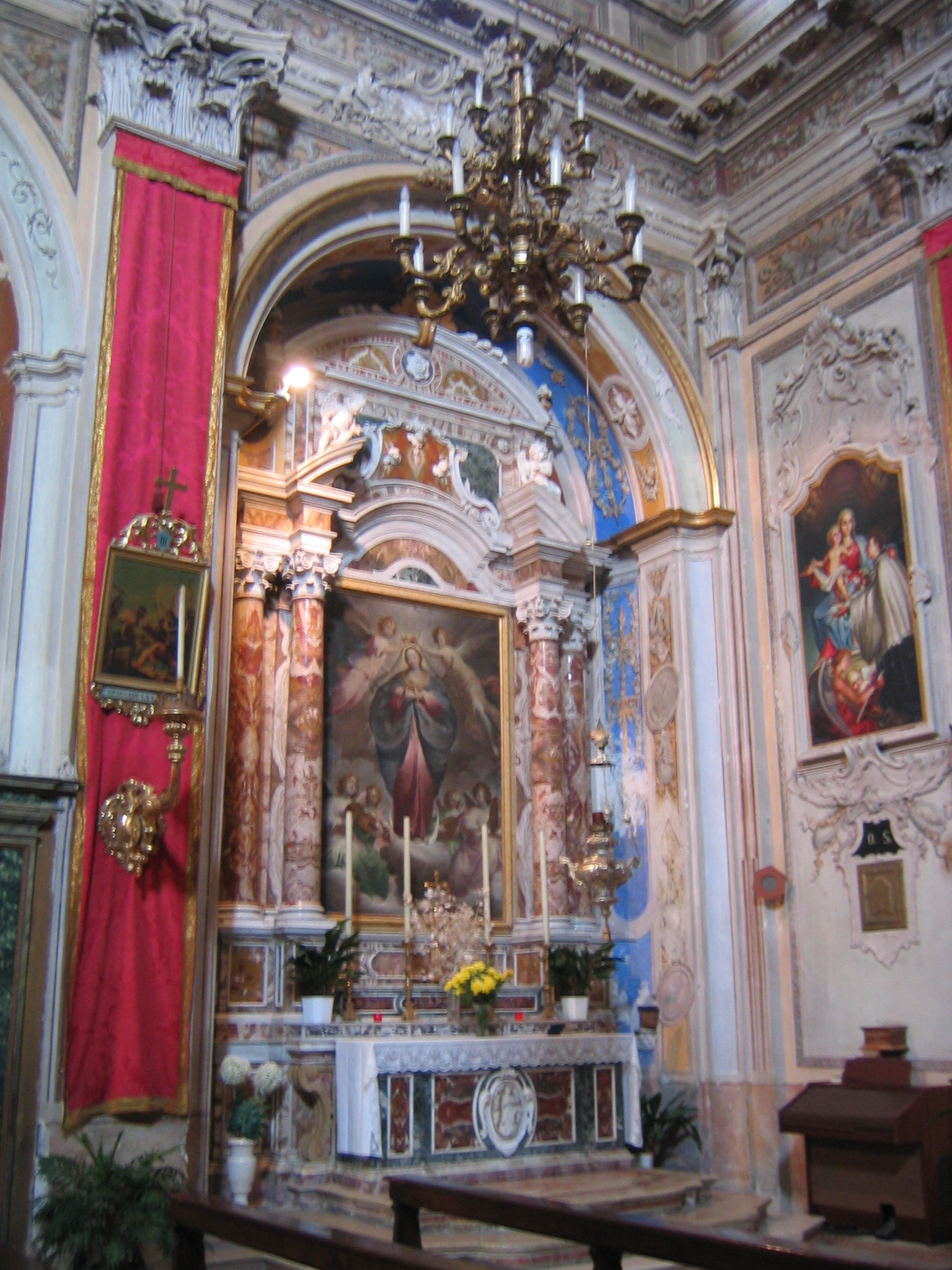 Immacolata concezione, Chiesa della Natività della Madonna - Polpenazze del Garda